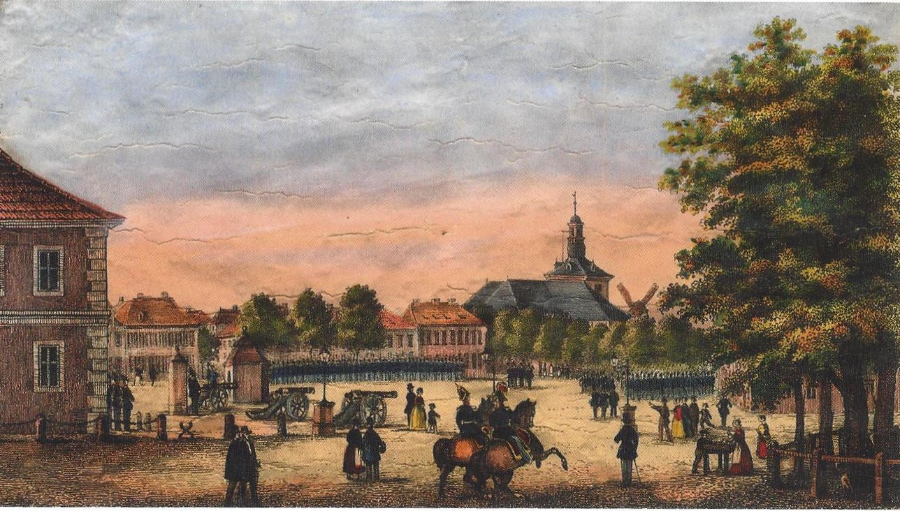 Paradeplatz in Rendsburg: Links neben der Christ- und Garnisonskirche steht das Gebäude der Kommandantur. Am 3. April 1848 trafen sich die Abgeordneten der vereinigten Ständeversammlung in der Kommandantur. Von dort zogen sie in die Kirche, in der Johann Friedrich Callisen den Eröffnungsgottesdienst für die Ständedeputierten hielt.